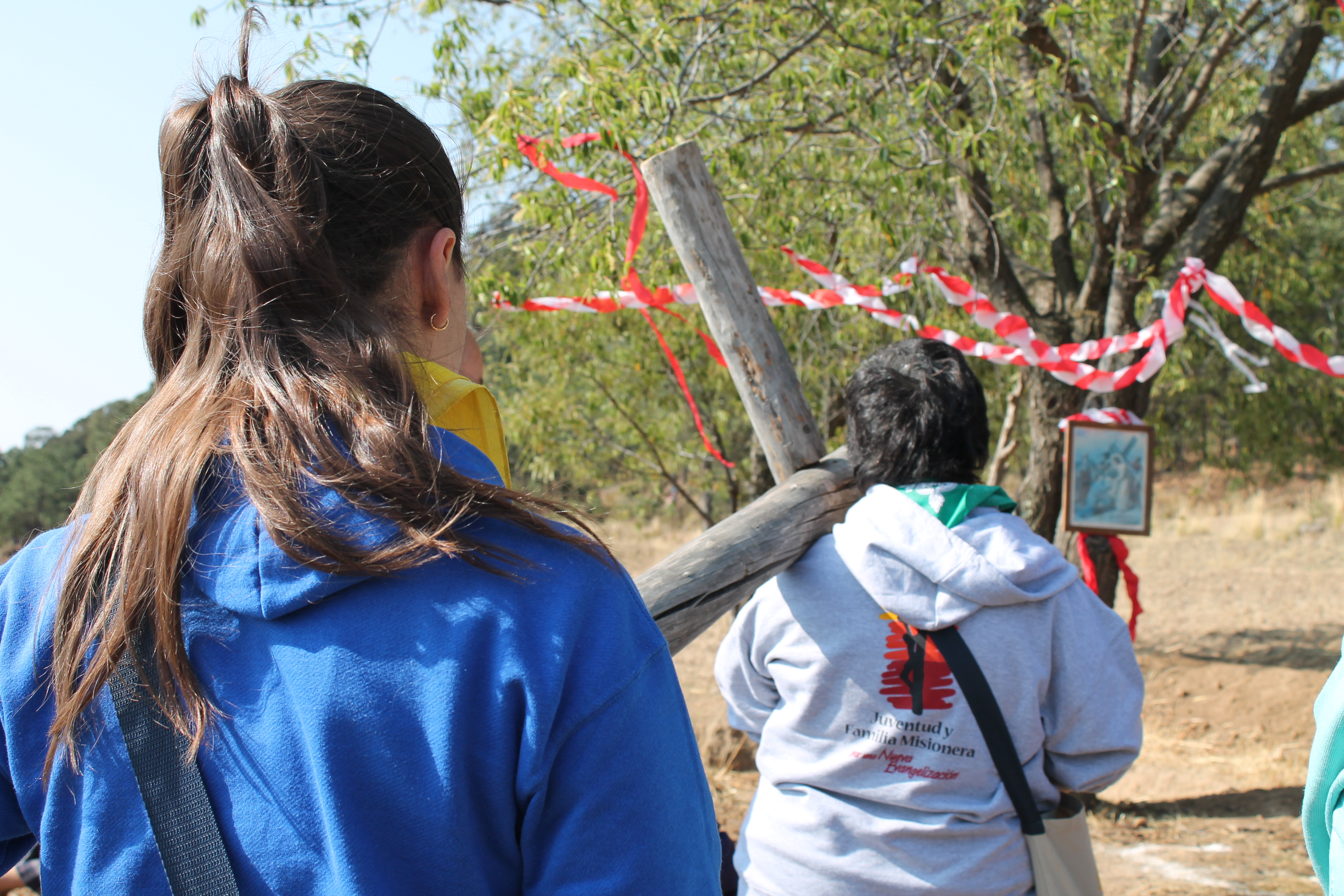 Procesión del Vía Crucis que se lleva a cabo el viernes santo en la comunidad de Las Mesas, Lázaro Cárdenas, Tlaxcala.